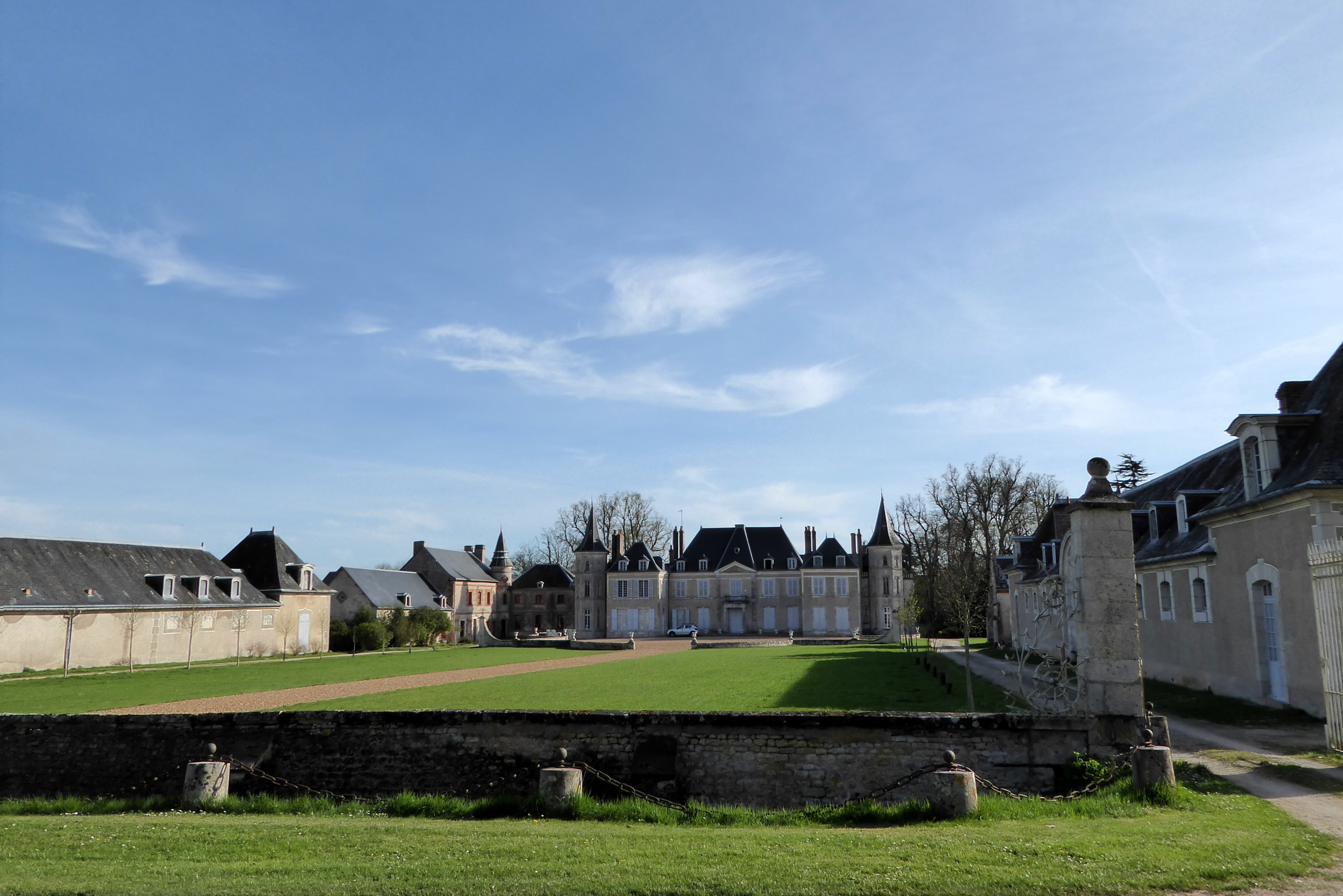 Château de Cambray, Germignonville, Eure-et-Loir (France).